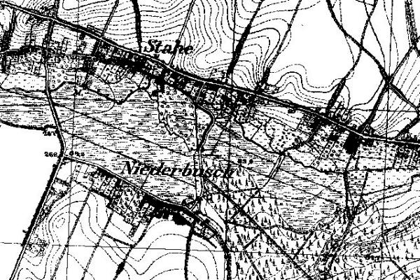 Neuaufnahme 1891-1912